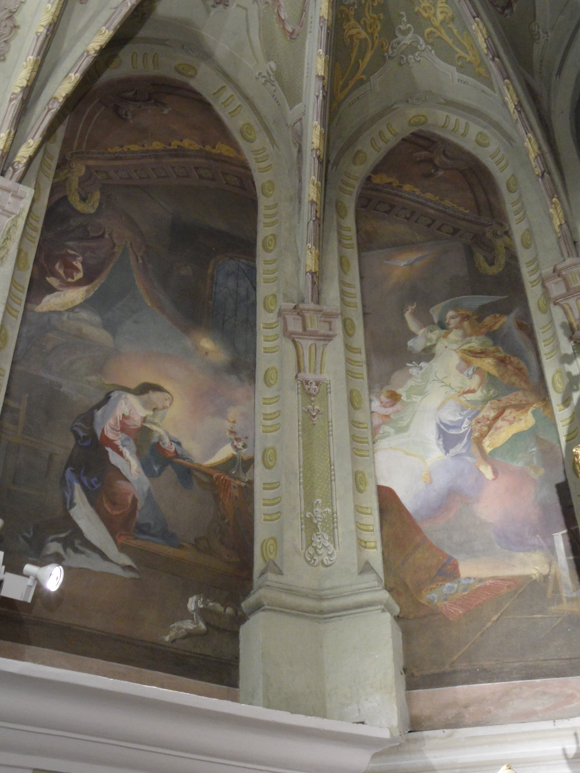 Freska Zvěstování, kostel Nejsvětější Trojice, Brno-Královo Pole (kol. 1769) - Franz Anton Maulbertsch